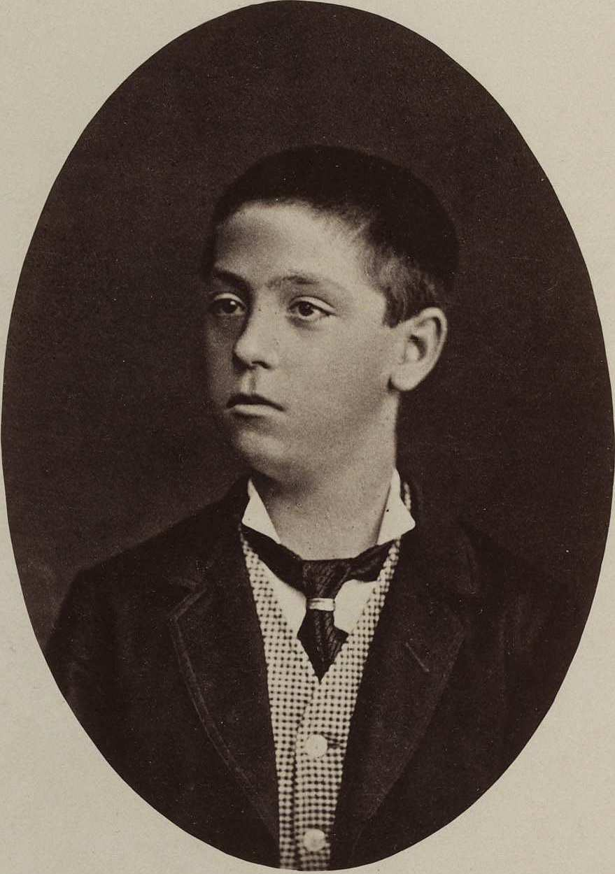 "S.A. D. LUIS JESUS DE BORBON Y BORBON/(Hijo de los infantes D. Sebastian y Dª. María Cristina)"